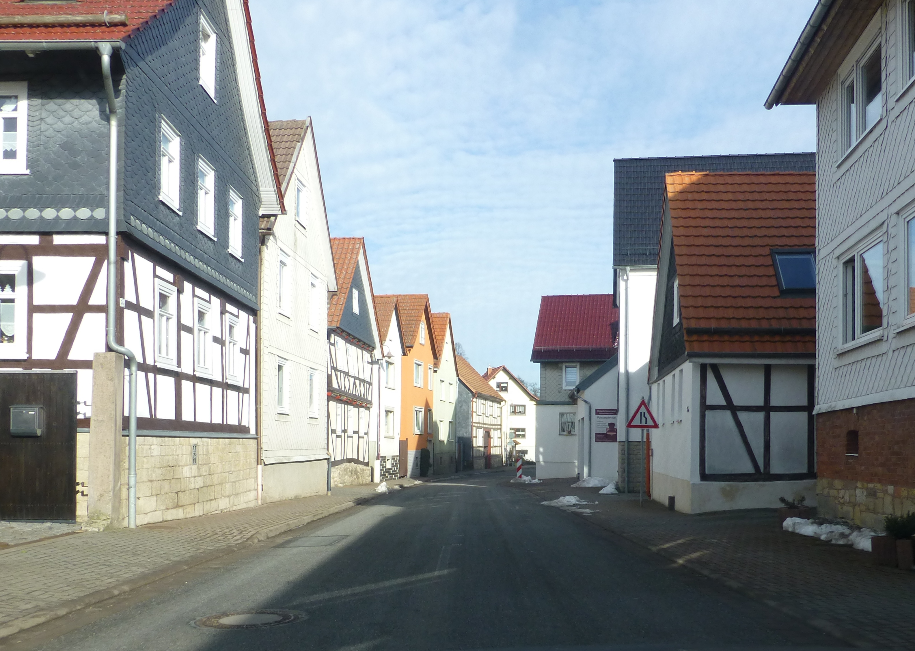 Dorfstraße in Heuthen